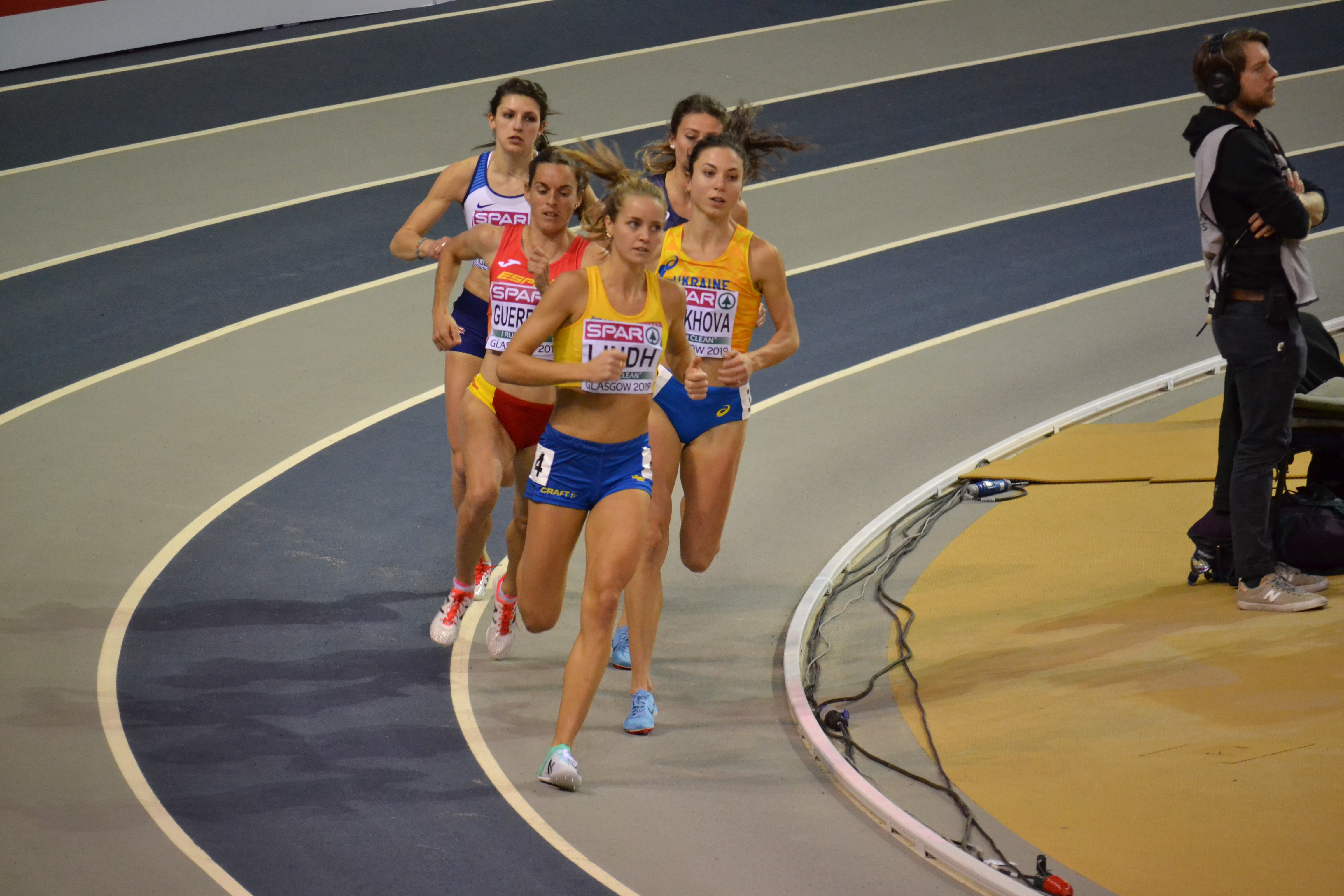 Womens 800m